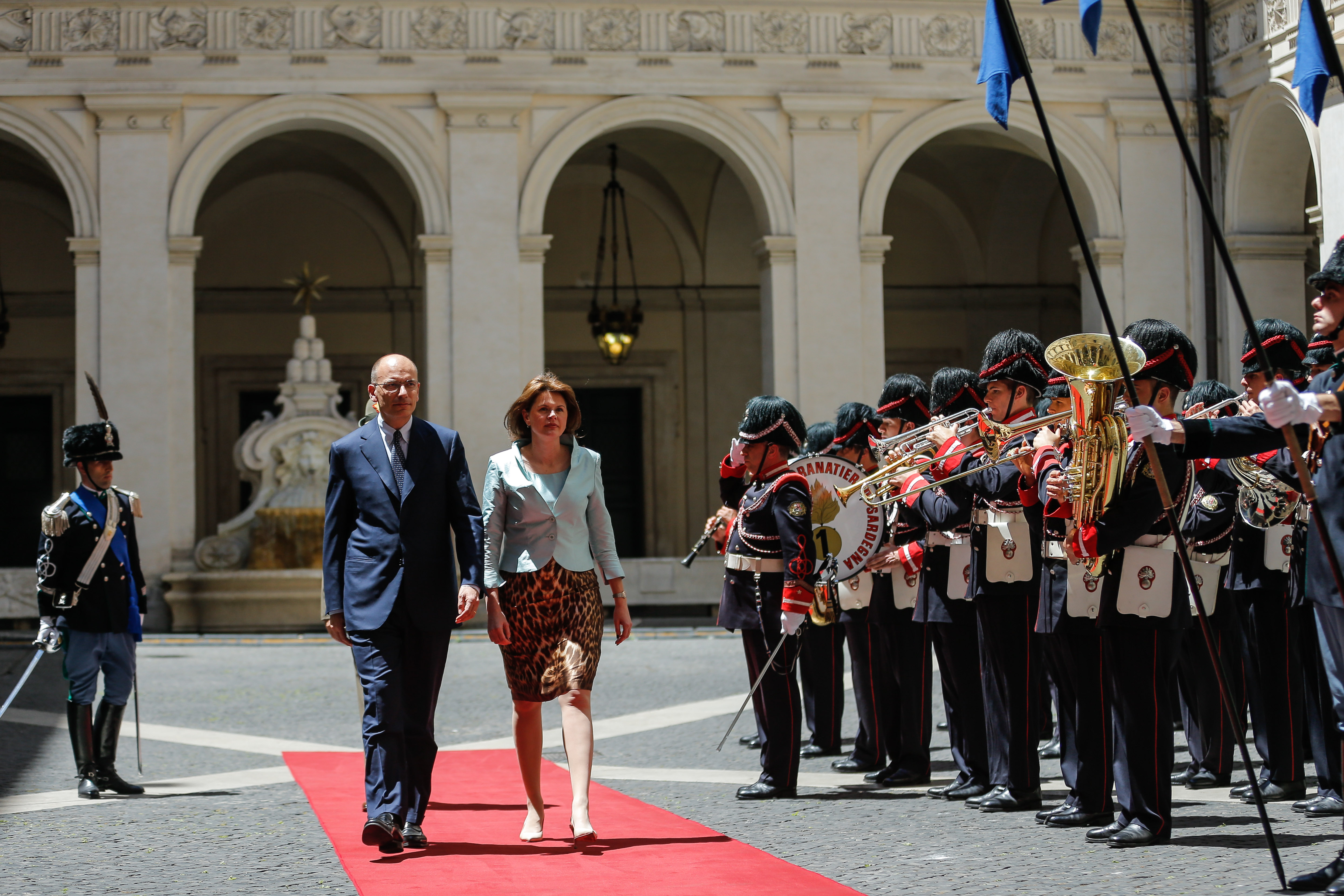 Srečanje premierke Alenke Bratušek z italijanskim premierom Enricom Letto